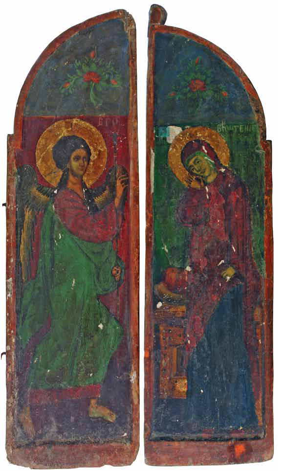 рхангел Гаврил... Детал од царските двери од црквата свети Никола во село Зрзе